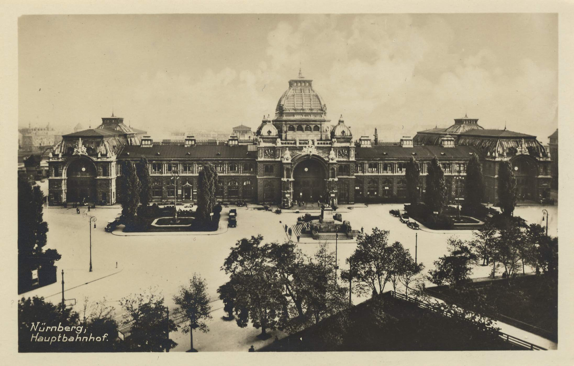 Nürnberg Hauptbahnhof auf einer Postkarte um das Jahr 1900